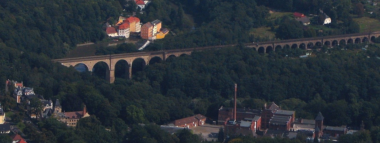 Luftbild Eisenbahnviadukt Lausitzer Neiße Viadukt Sachsen Saxony Germany, Picture cropped